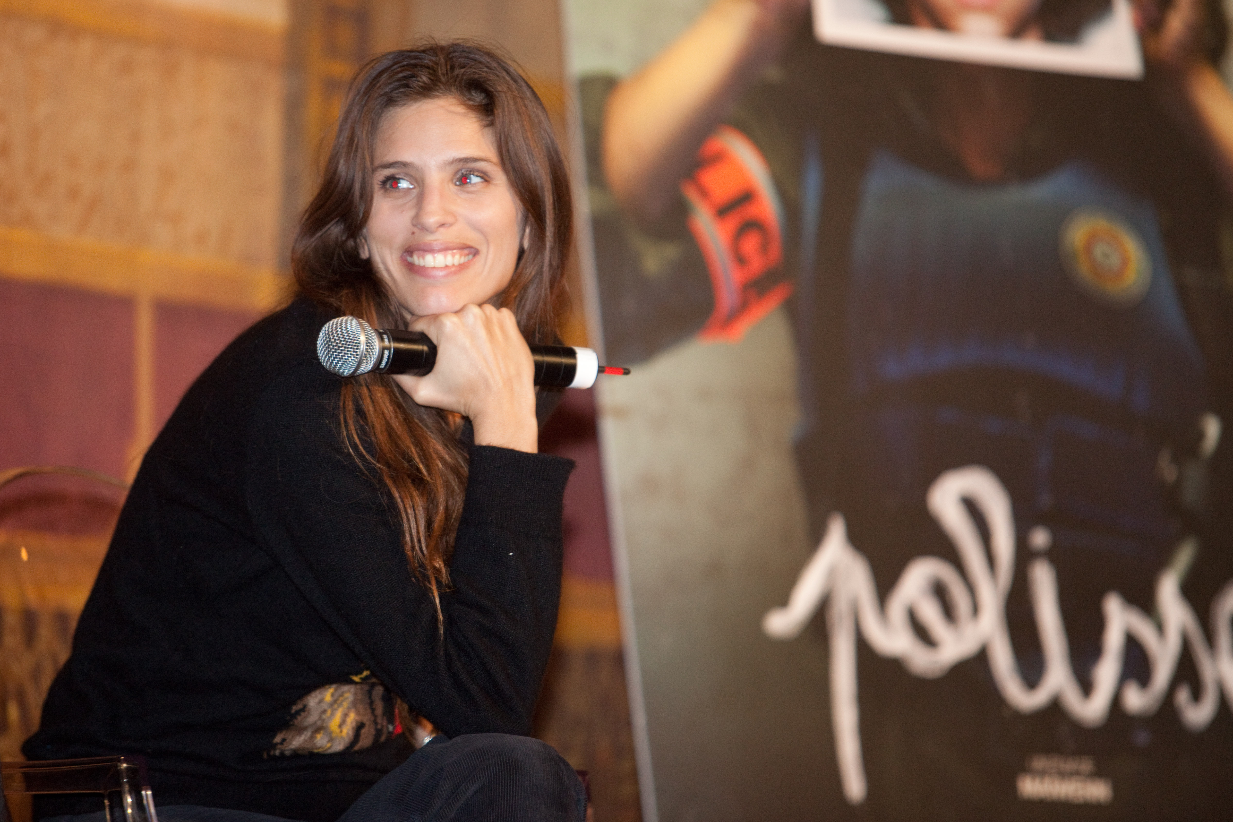 Maïwenn Cinemania 2011